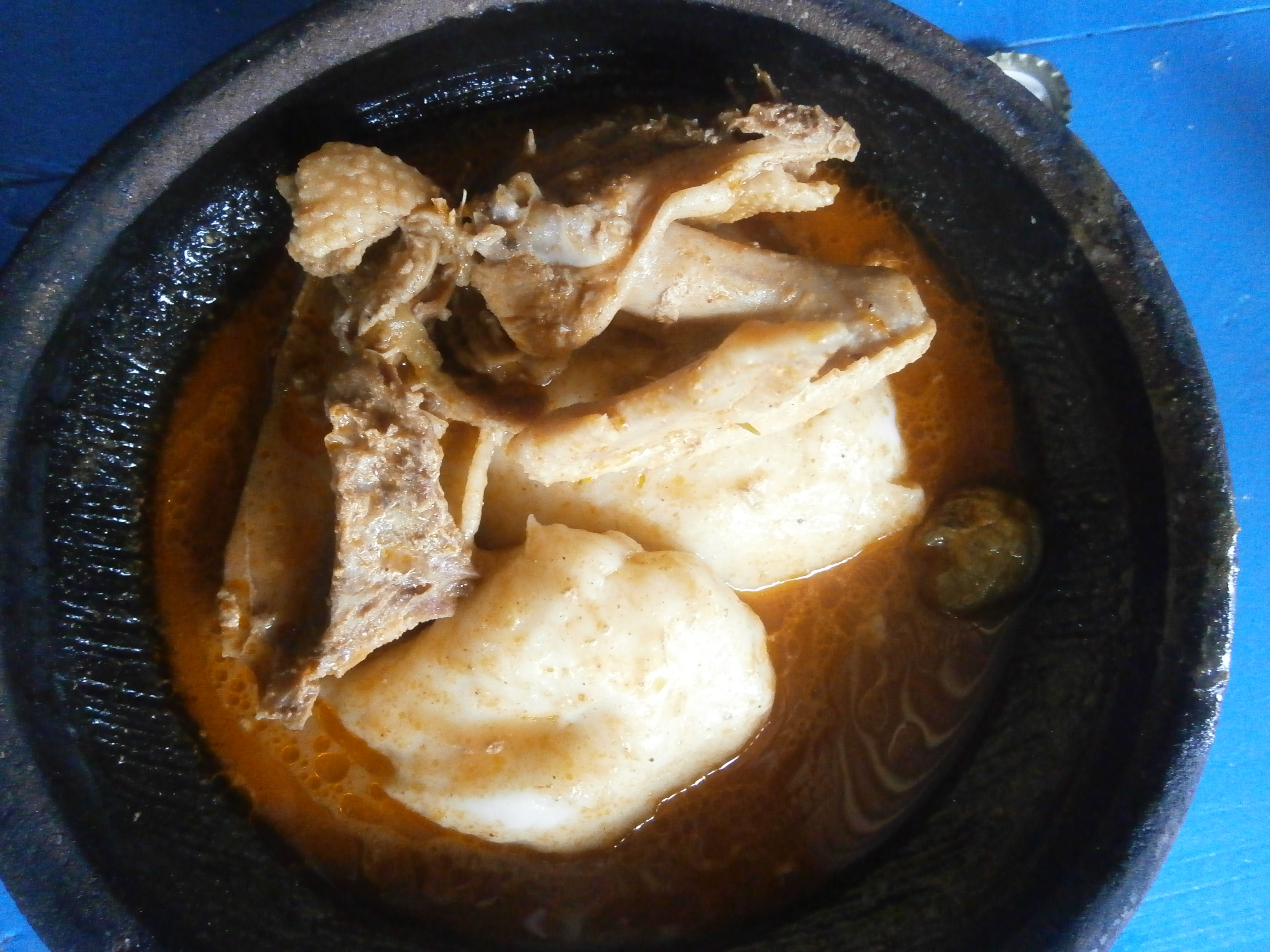 Spécialité togolaise, le plat de fufu [lire foufou] peut être fait à base de tubercule de manioc, d'igname de tarot ou à base de banane plantain. Il est généralement accompagné d'une sauce arachide au poulet [comme dans cette image], de sauce graine, de "sauce blanche" ou n'importe quelle sauce avec viande ou poisson. This is an image of food from Togo